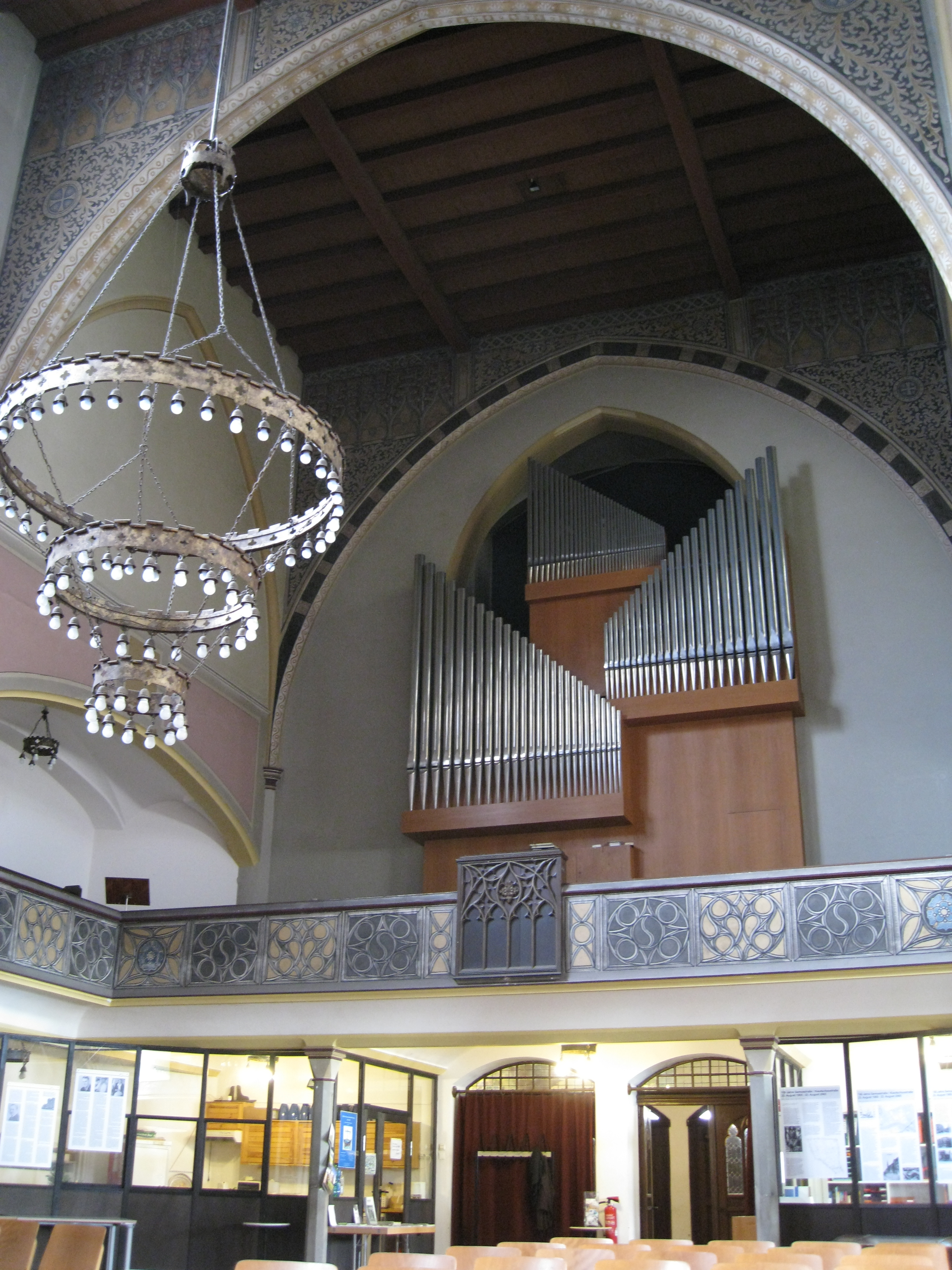 Innenraum mit orgel der Osterkirche in Berlin-Wedding